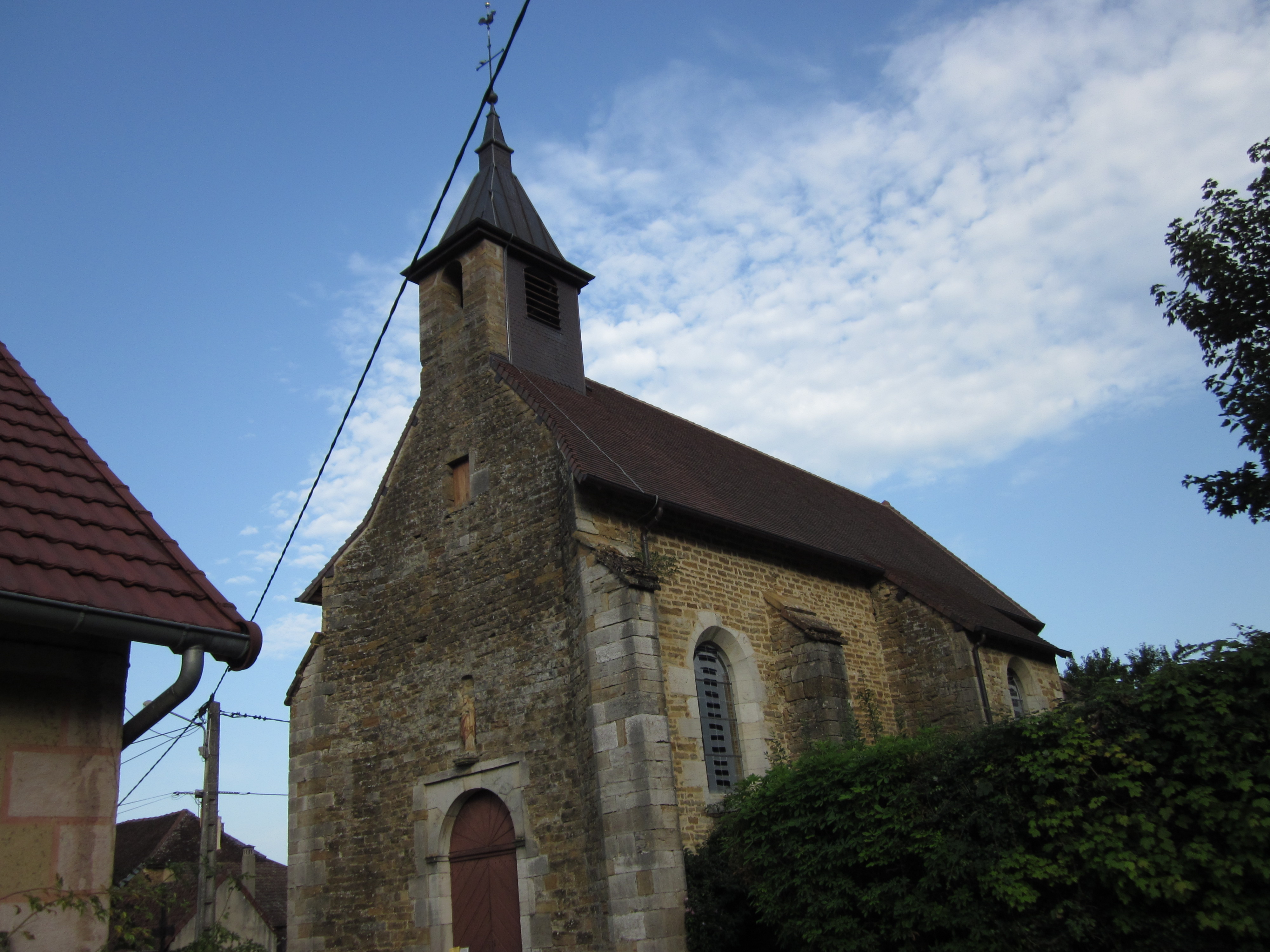 église de Monay (Jura)